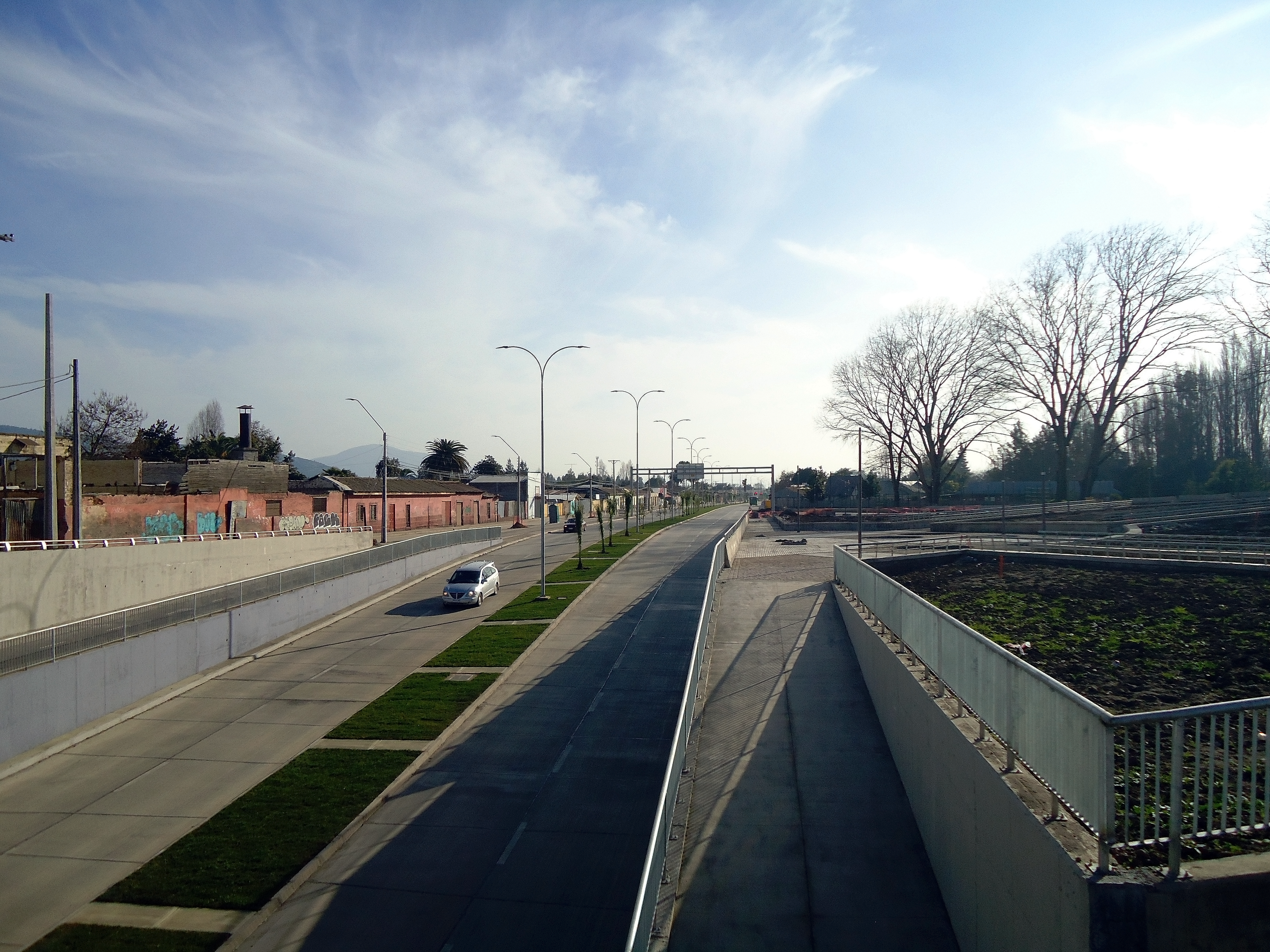 Nueva avenida Riquelme en Rengo